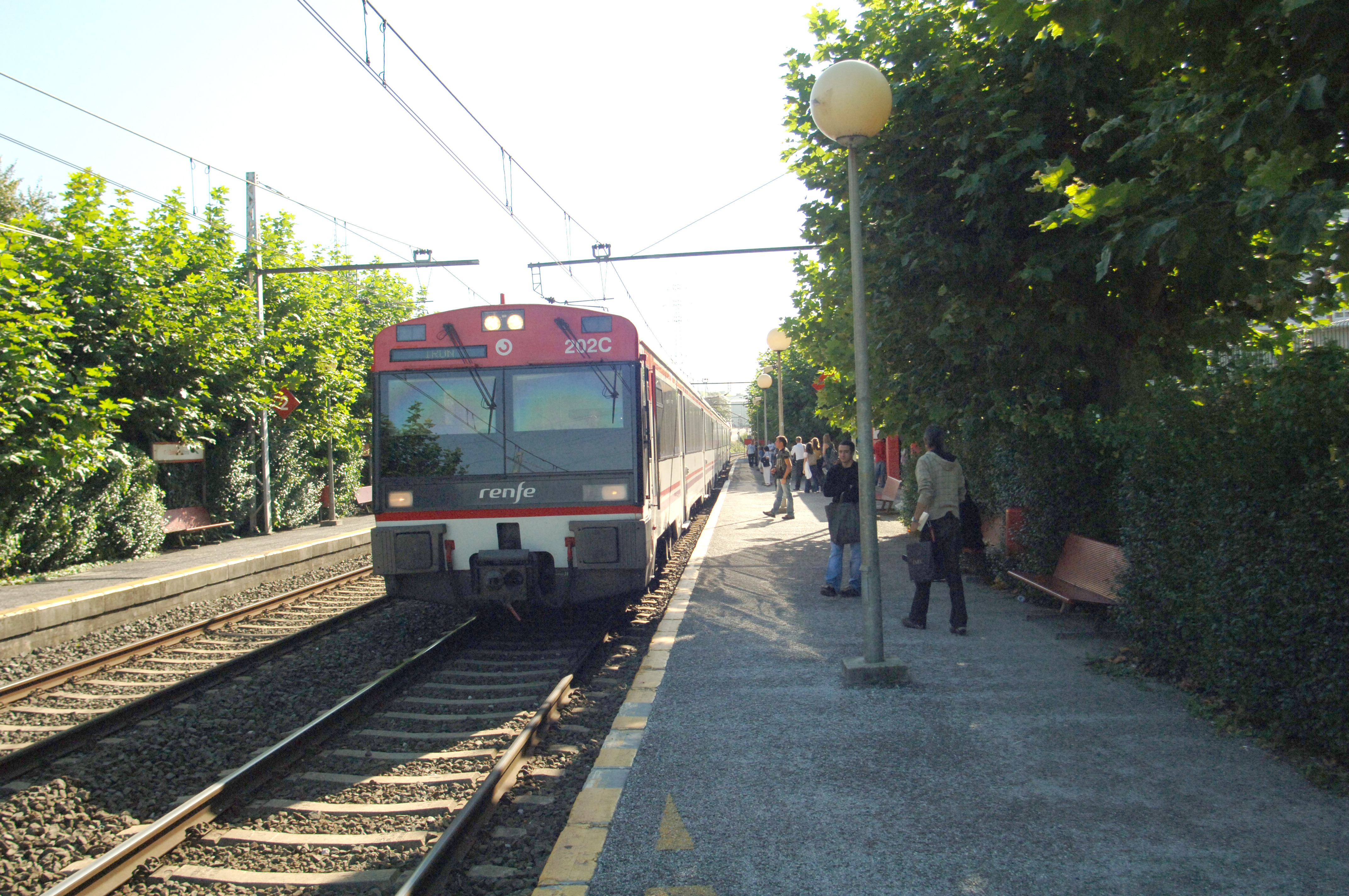 Andenes de la estación